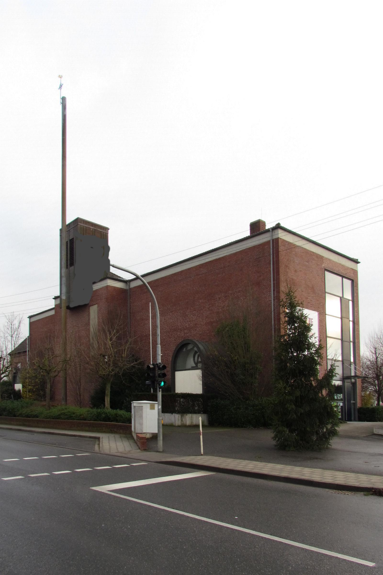 Kirchen, Kapellen in Heinsberg